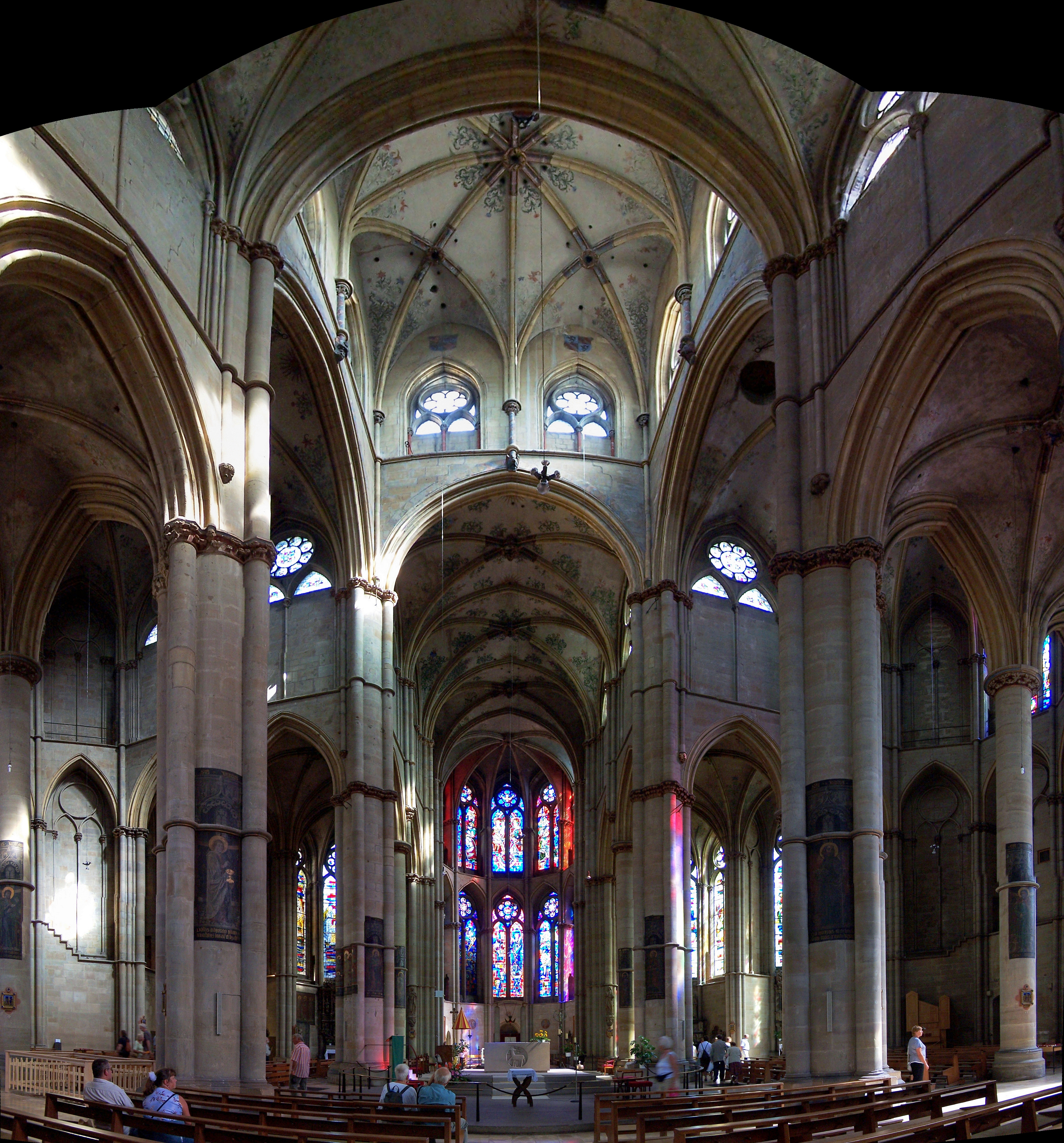 Liebfrauen Kirche in Trier. Verglasung des Chores von Jaques Le Chevallier aus Fontenay-aux-Roses ab 1953 ausgeführt.